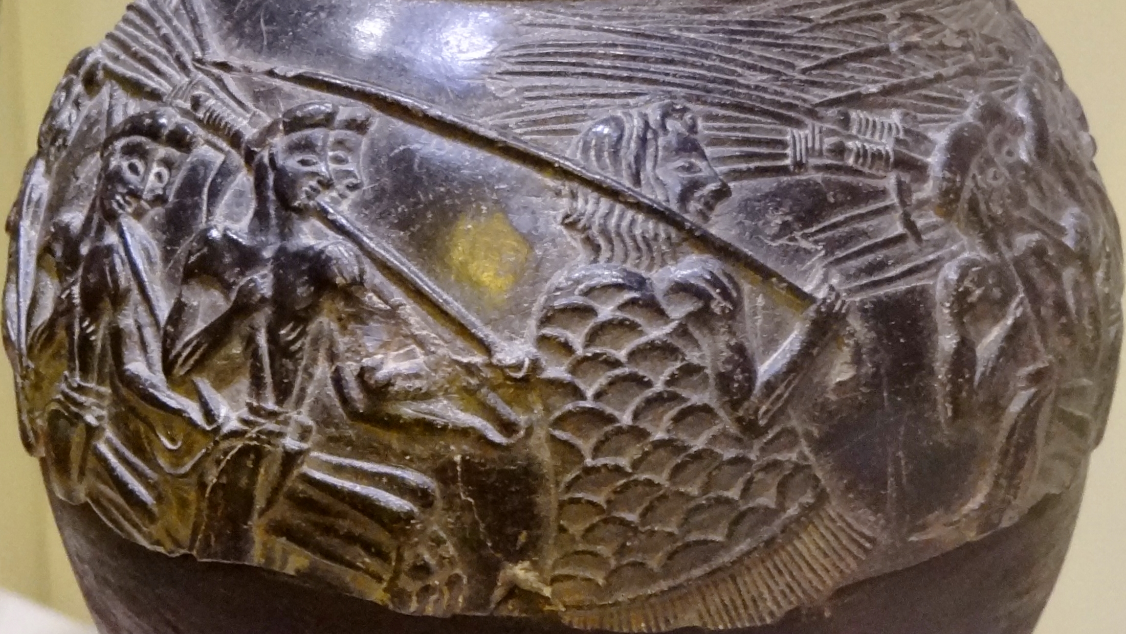 Detail des Reliefs der „Schnittervase“, Reliefrhyton aus Speckstein (Neupalastzeit 1500–1450 v. Chr.) aus Agia Triada, ausgestellt im Archäologischen Museum Iraklio, Kreta, Griechenland